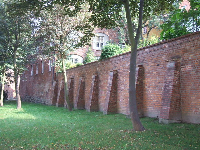 Stralsund,_Germany,_Stadtmauer_(2006-09-29)